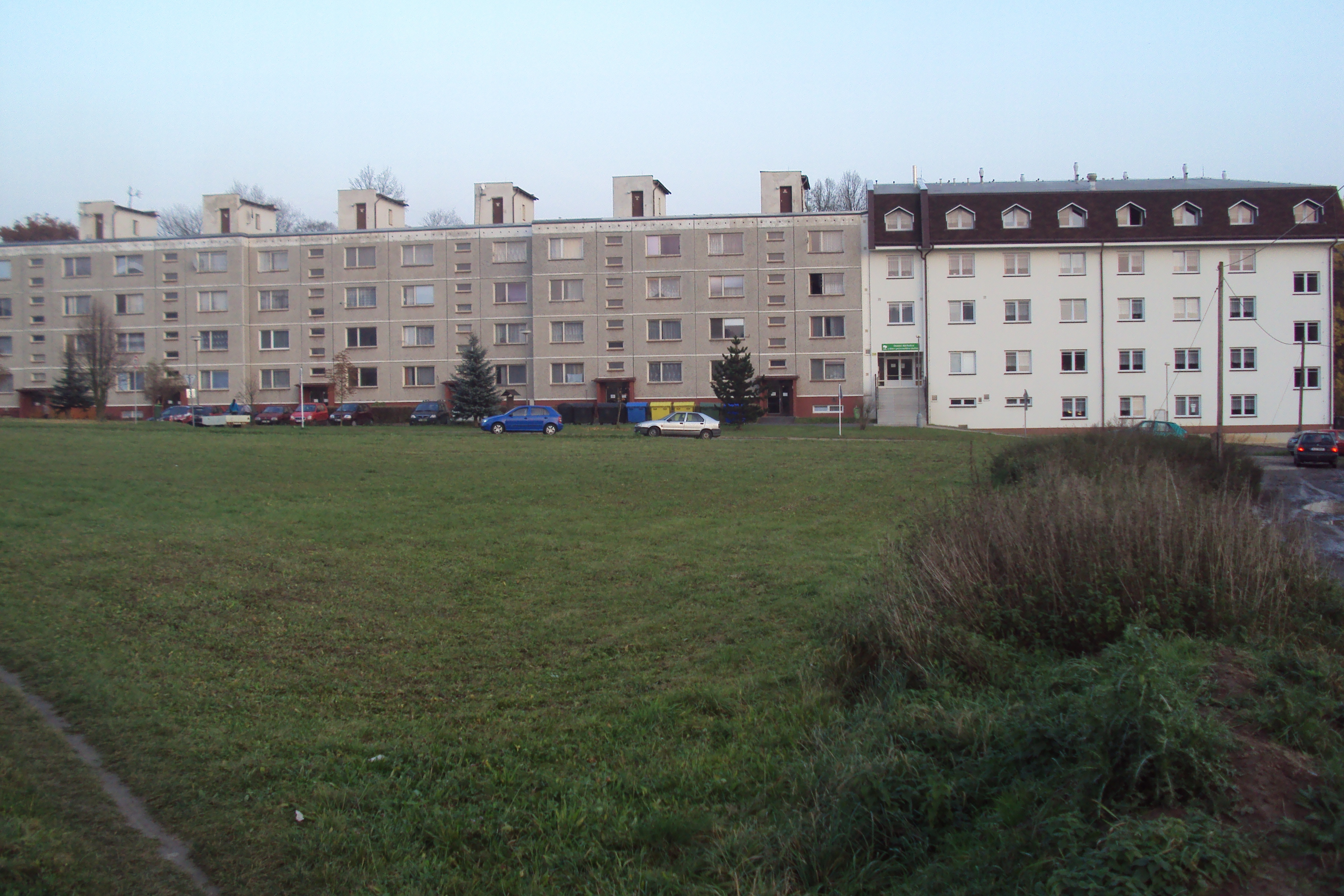 Dům s pečovatelskou péčí je nalevo, Domov důchodců navazuje zprava, sídliště Nové Zákupy